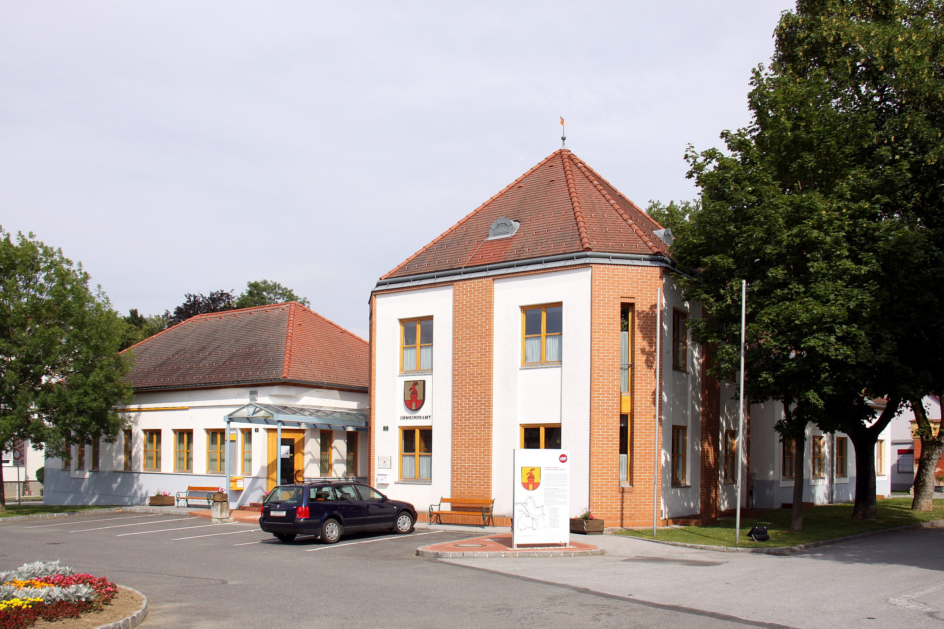 Gemeindeamt in Rotenturm an der Pinka - OpenStreetMap(Info)